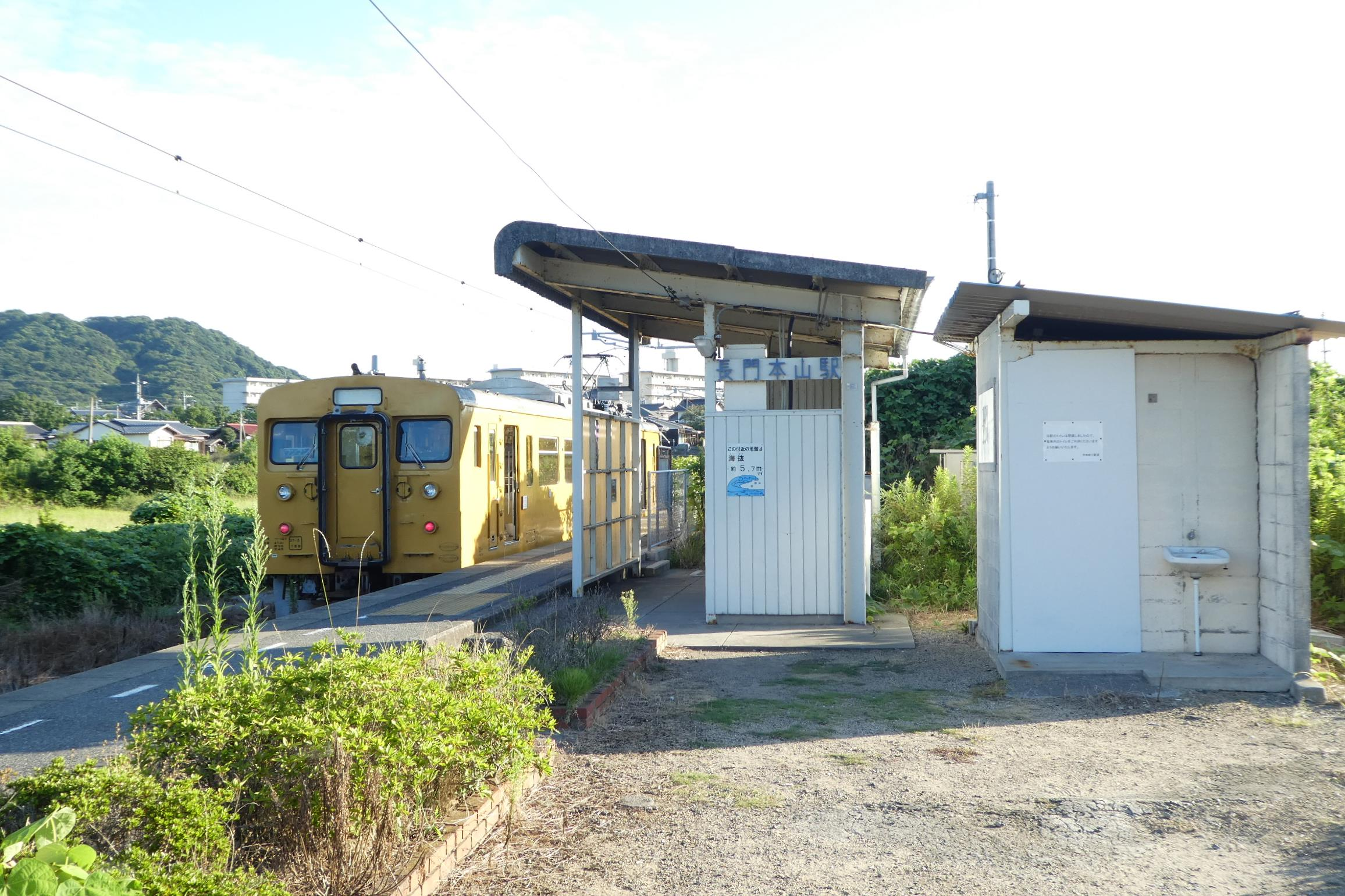 JR小野田線長門本山駅。